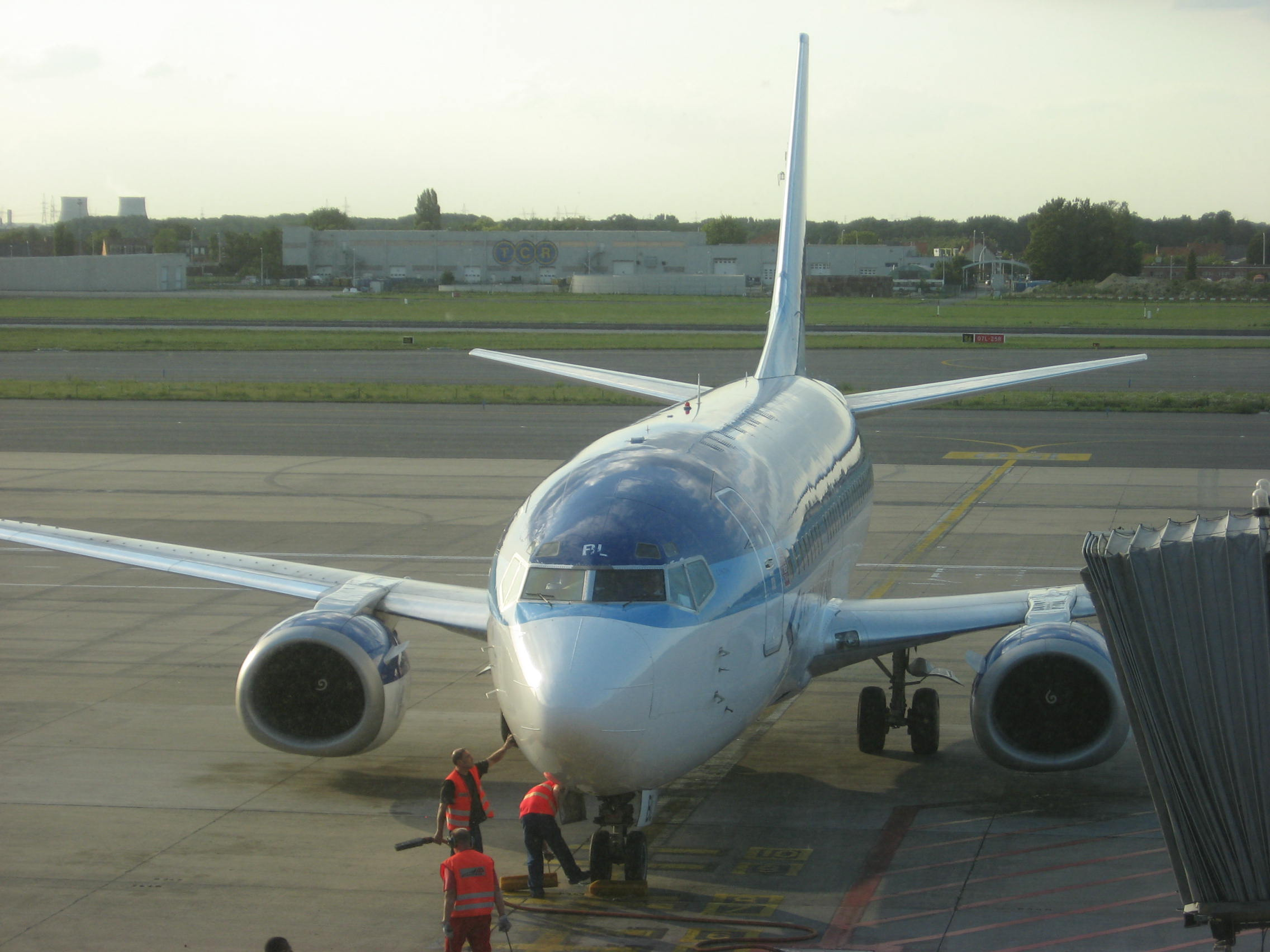 Estonian Airi Boeing 737 Brüsseli lennujaamas.